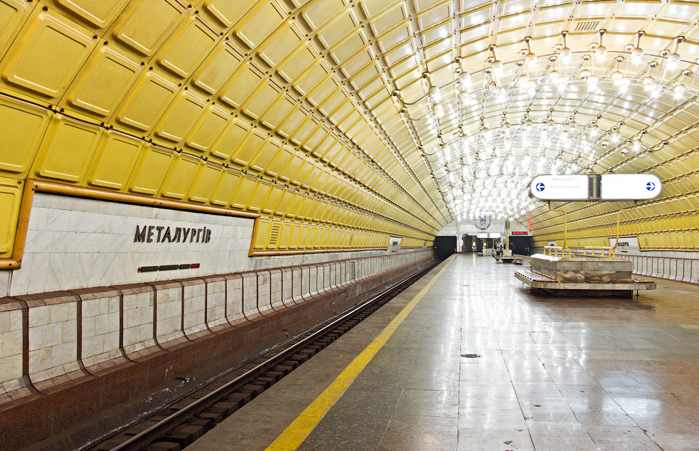 Станция Металлургов Днепропетровского метрополитена.